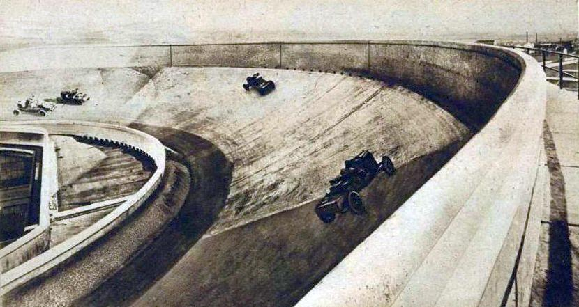 L'autodrome du toit des usines Fiat à Turin (au Lingotto - 1928).